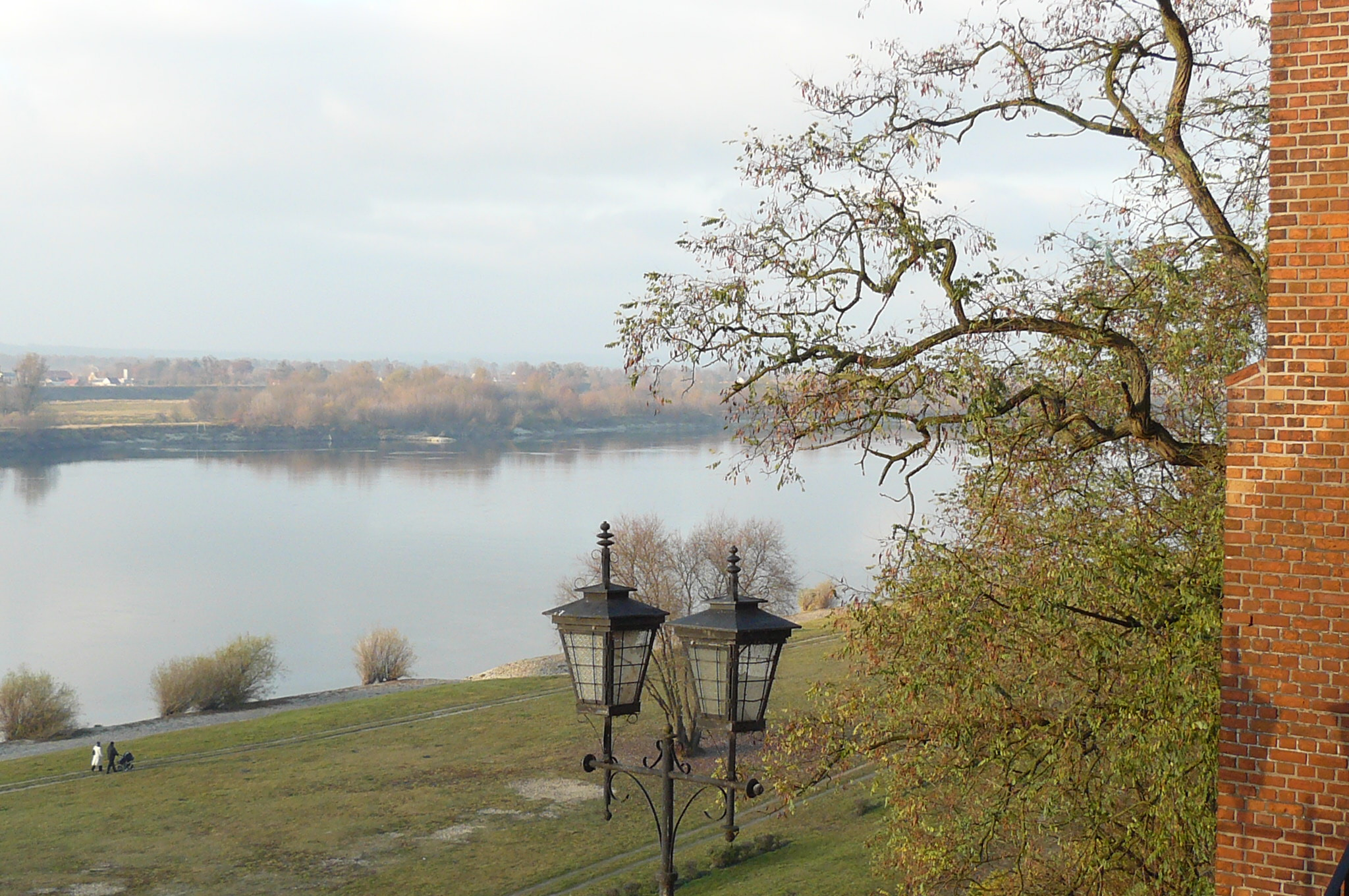 Wisła in Grudziądz (Granaries).